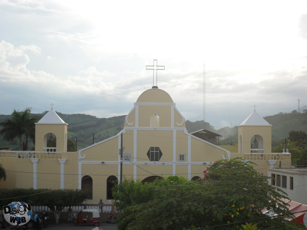 Iglesia Catolica, en el Centro de La Ciudad de Gualan